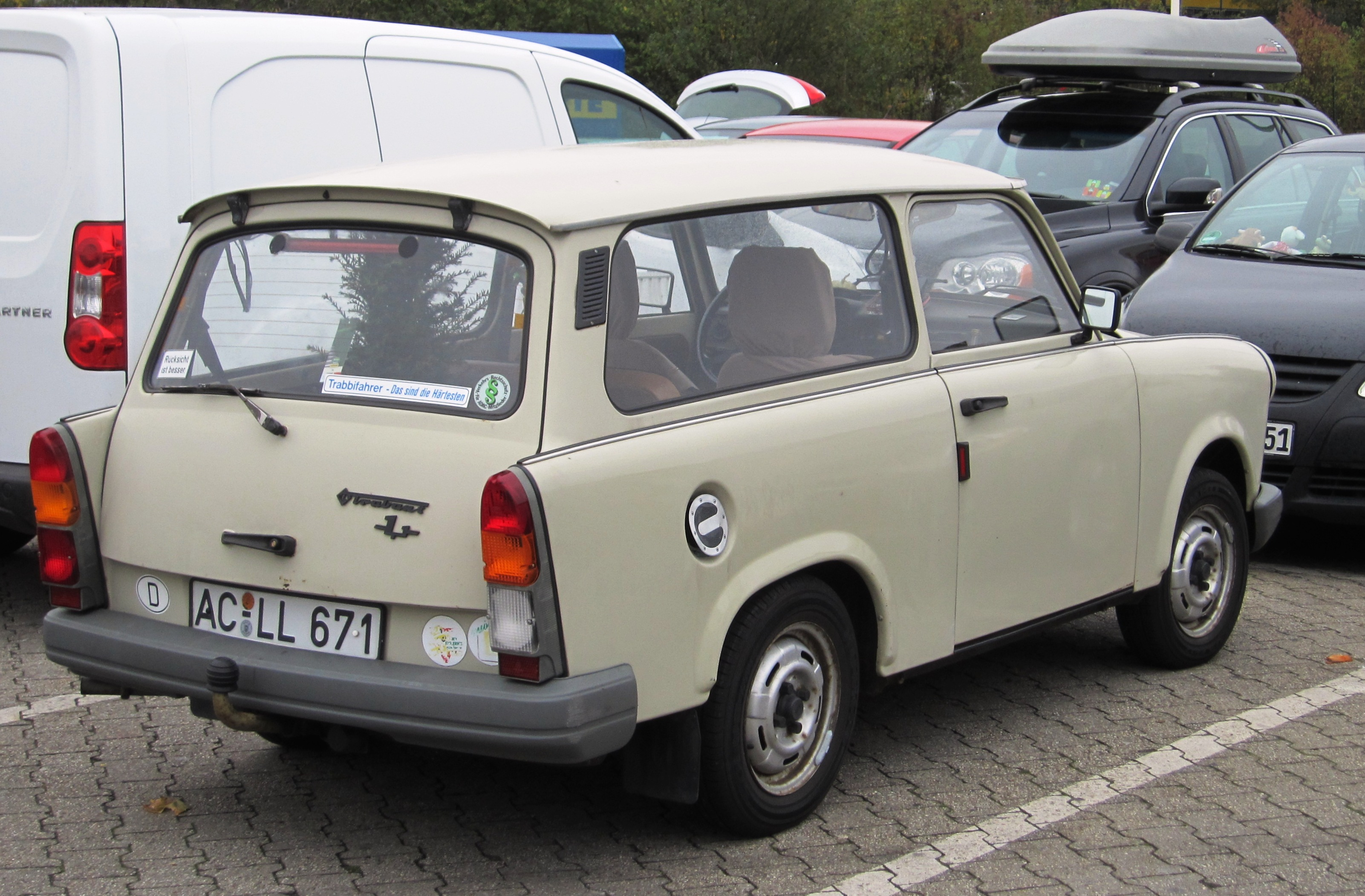 Trabi 1.1 Universal munie d'une etiquette de defi